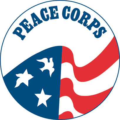 Logo des Friedenscorps